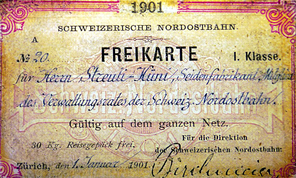 Die Freikarte 1. Klasse des Horgner Industriellen und NOB-Verwaltungsrats Emil Streuli-Hüni für das Jahr 1901. Im Jahr darauf ging die NOB in den 1898 gegründeten Schweizerischen Bundesbahnen auf.